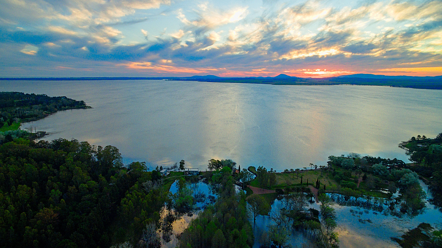 Лагуна-дель-Саусе